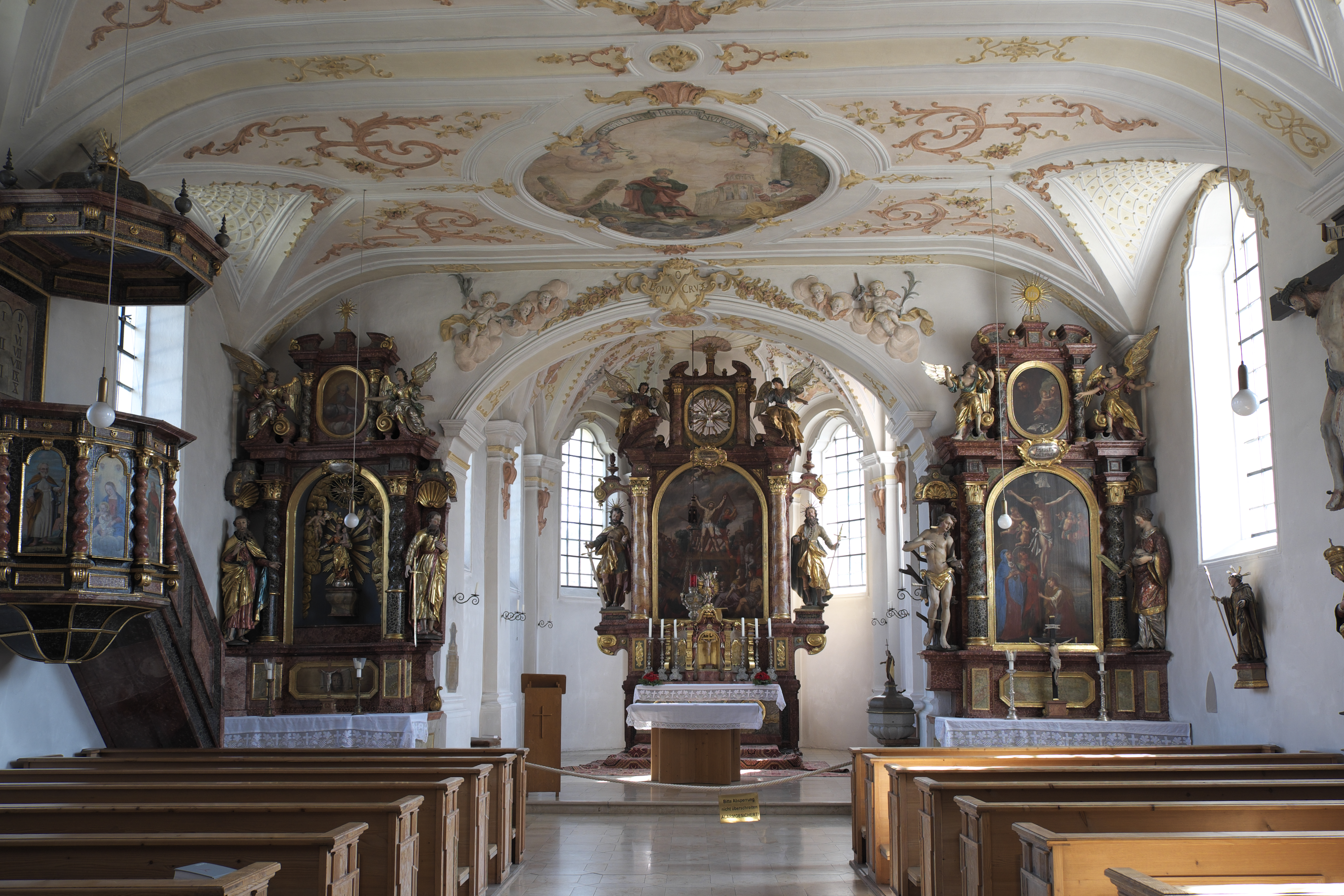 Alte katholische Pfarrkirche St. Andreas in Eching im Landkreis Freising (Bayern/Deutschland), Innenraum